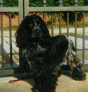 Cocker hembra blanca y negra de 2 años